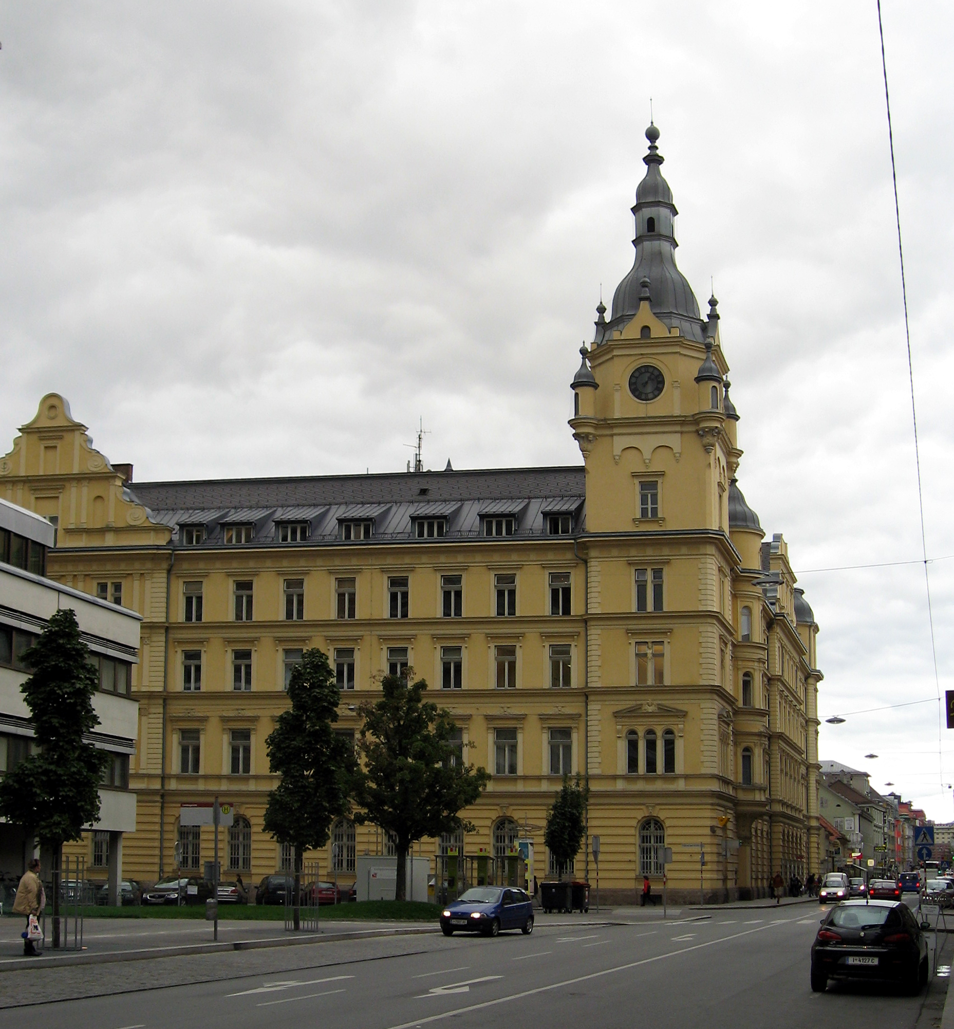 Österreich, Innsbruck, Innenstadt, ehemaliges Hauptpostamt , erb. 1904, Architekt: Leopold Bauer (1872-1938)